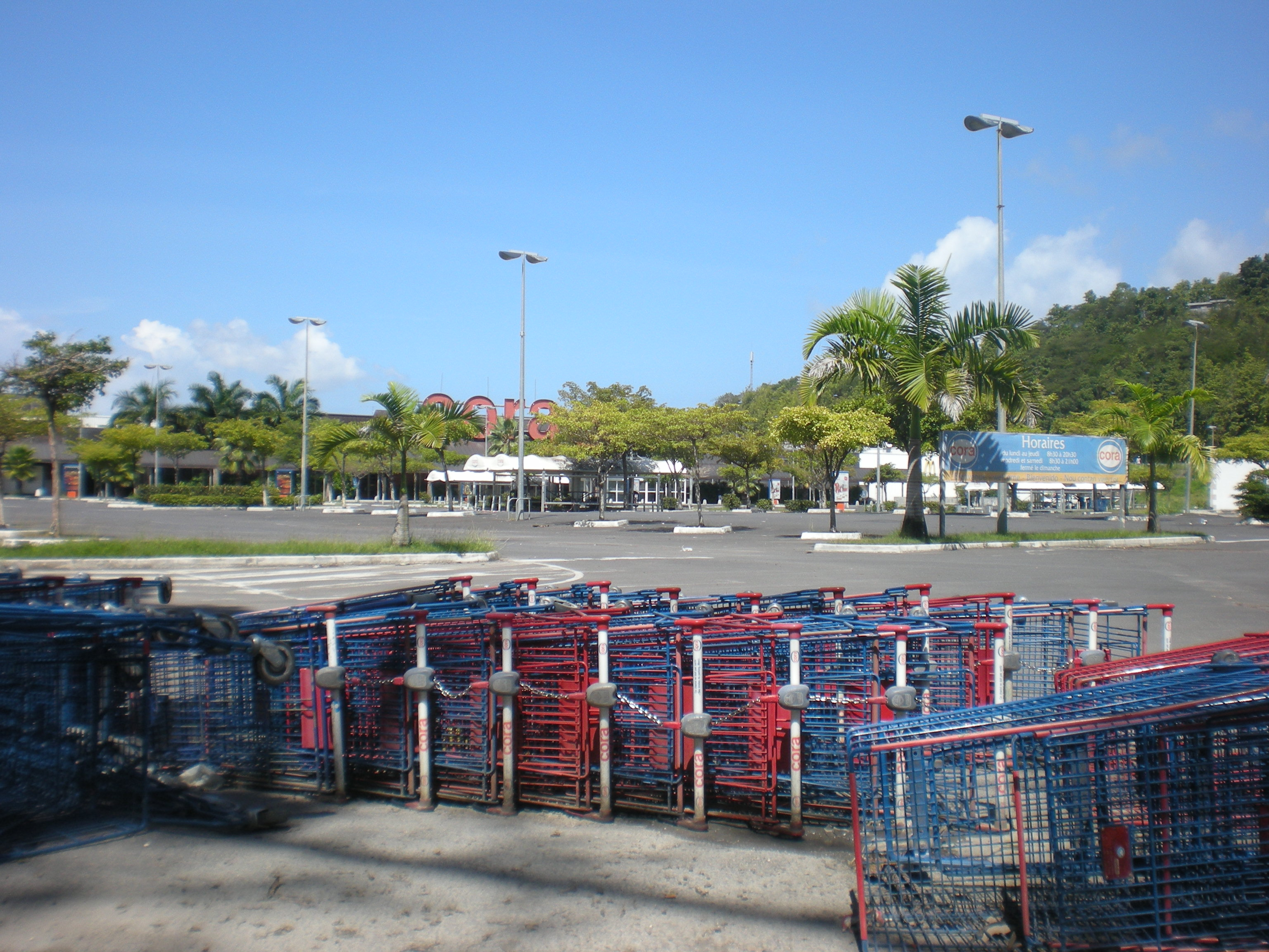 Grève générale Guadeloupe 2009 - Le centre commercial de Bas du Fort, Gosier, bloqué par les grévistes.